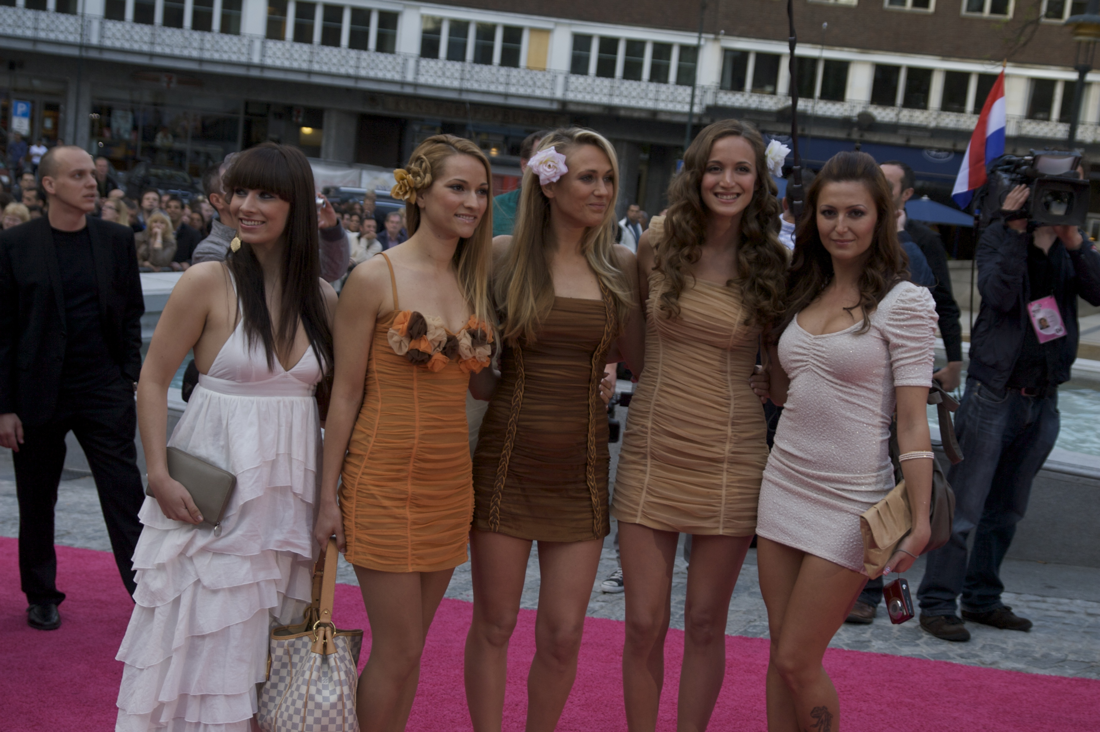 Foto: Vincent Hasselgård, Aktiv I Oslo.no